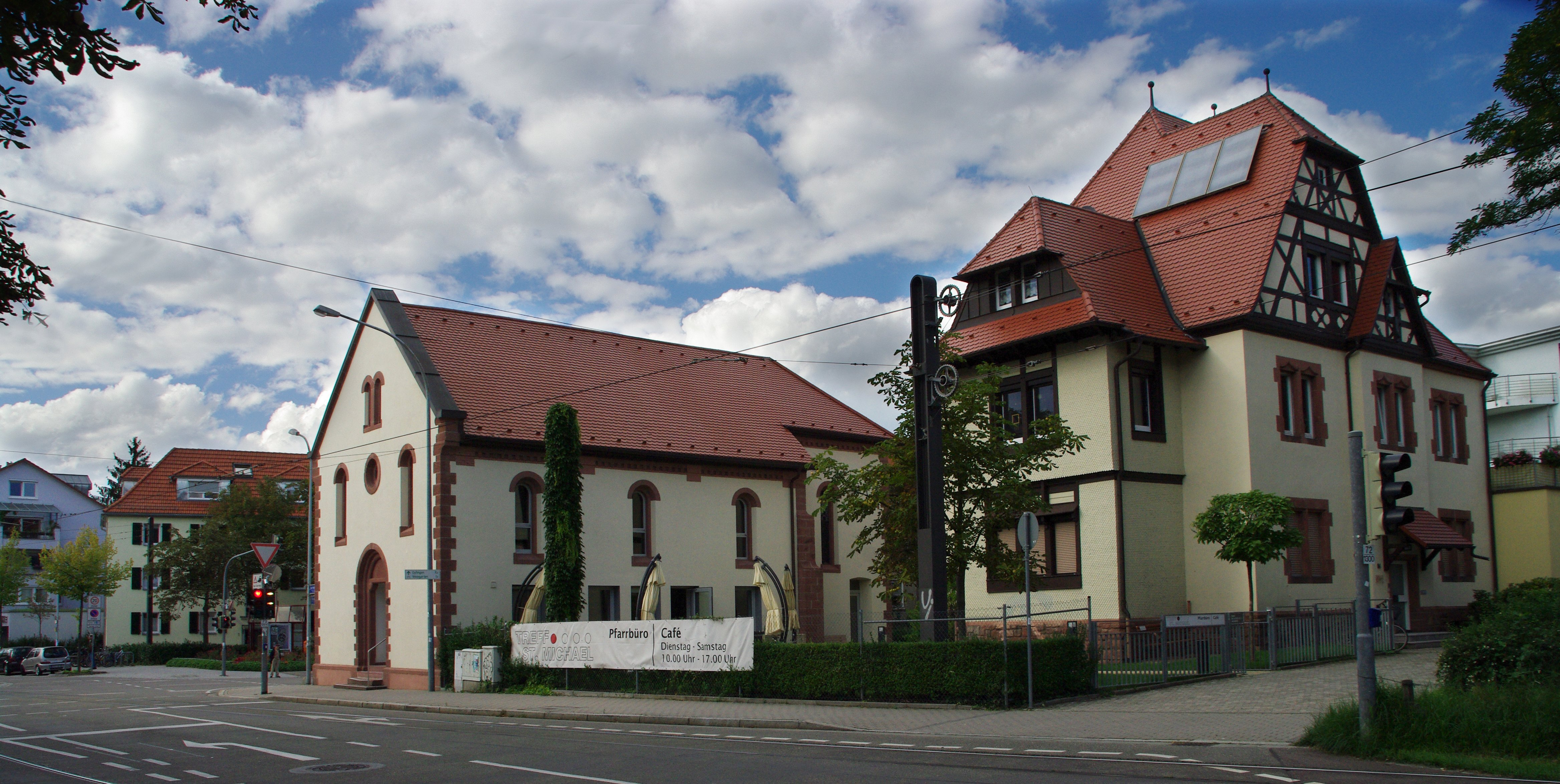 Das "alt Kirchle", die Kapelle St. Michael (erbaut 1866, Vorgängerkirche der heutigen Pfarrkirche) und das Pfarrhaus